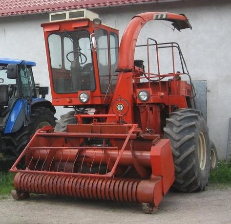 Sieczkarnia Z350/3 z podbieraczem